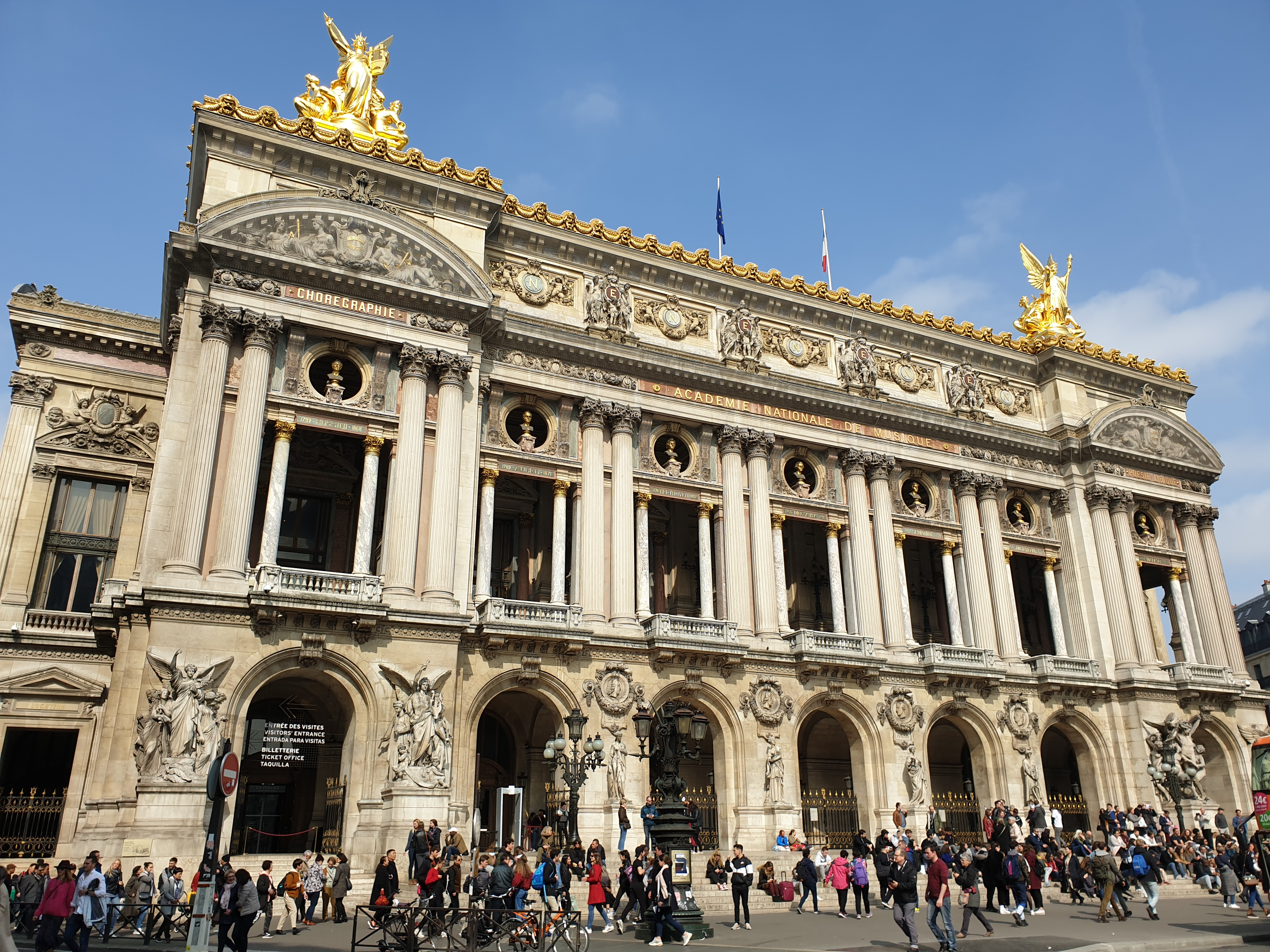 Palais Garnier - 2019-03-23